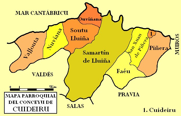 Mapa parroquial del conceyu de Cuideiru, dixebráu por colores.